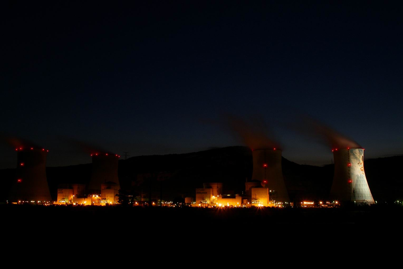 Centrale Nucleaire de Cruas en Provence (France)